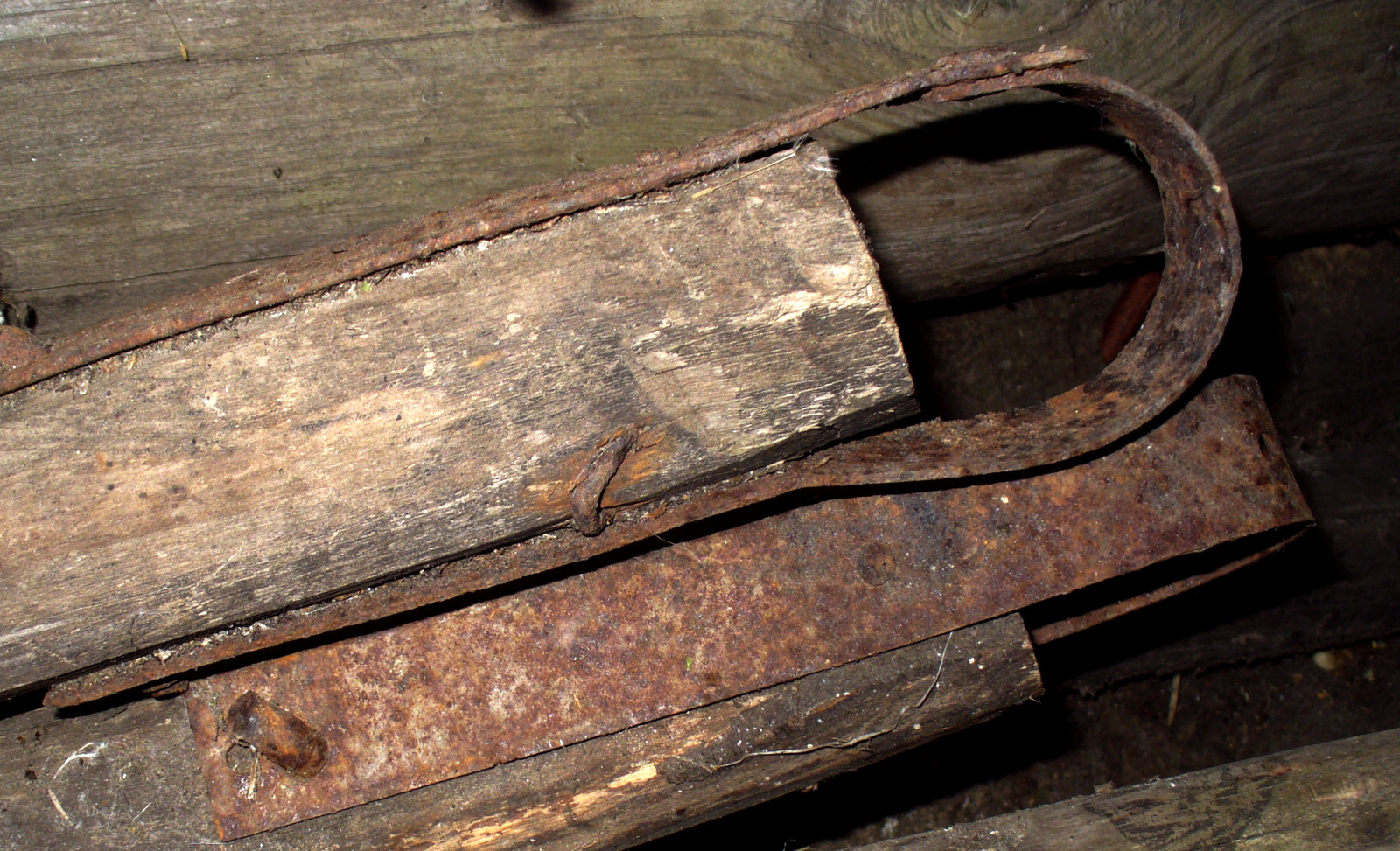 Концы оглобель от телеги. Беларусь. Витебская обл.